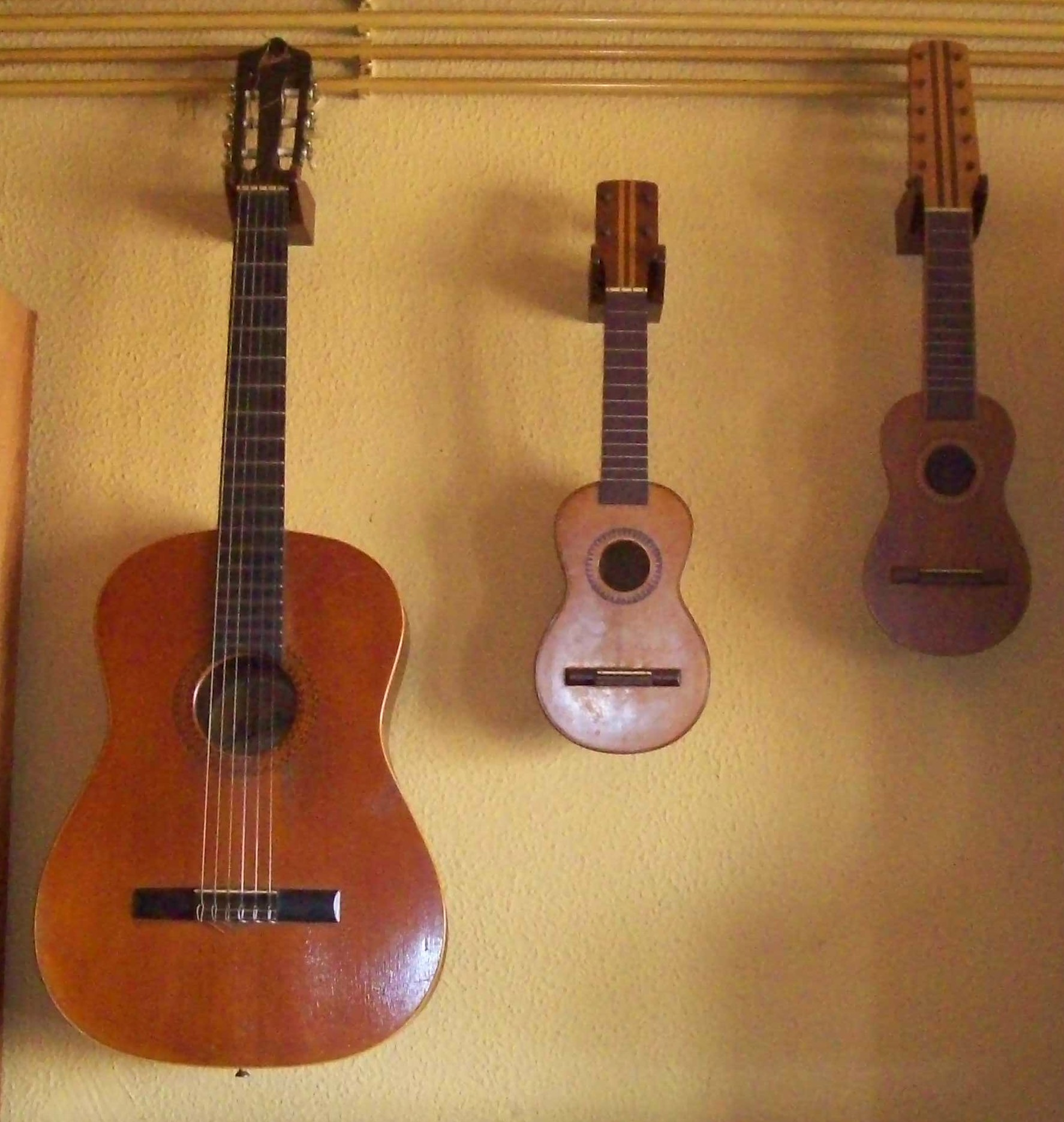 instruments de musique